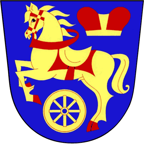 Znak Rozvadova